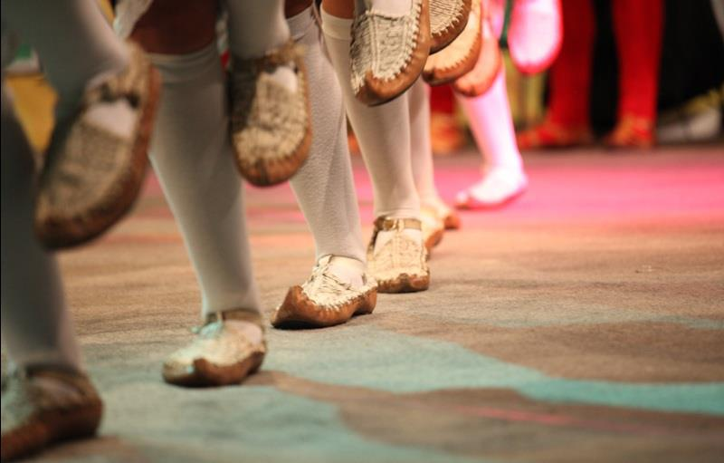 fotografija opanci